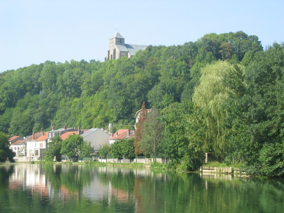 Ancienne citadelle de Dun-sur-Meuse depuis le fleuve